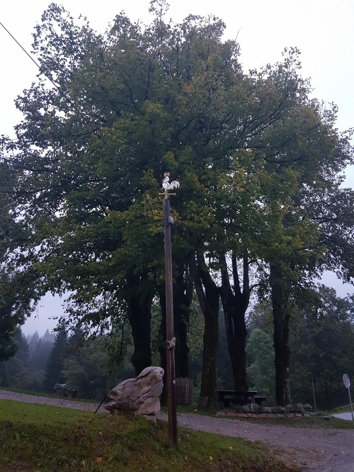 7 Linden in Dolnja Briga SLO ehemals Niedertiefenbach in Gottschee